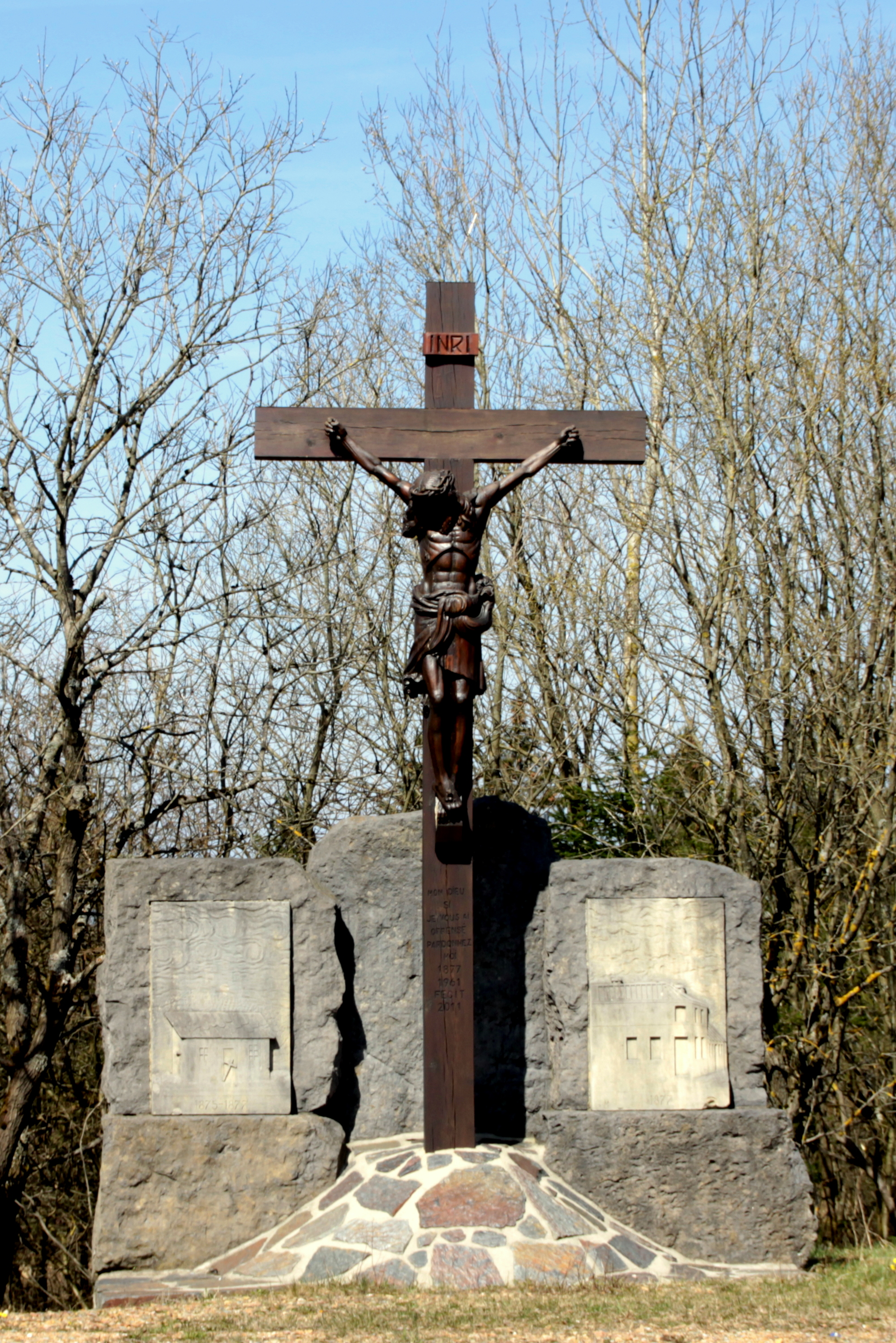 D'Kräiz op der Kräizung Belle-Croix